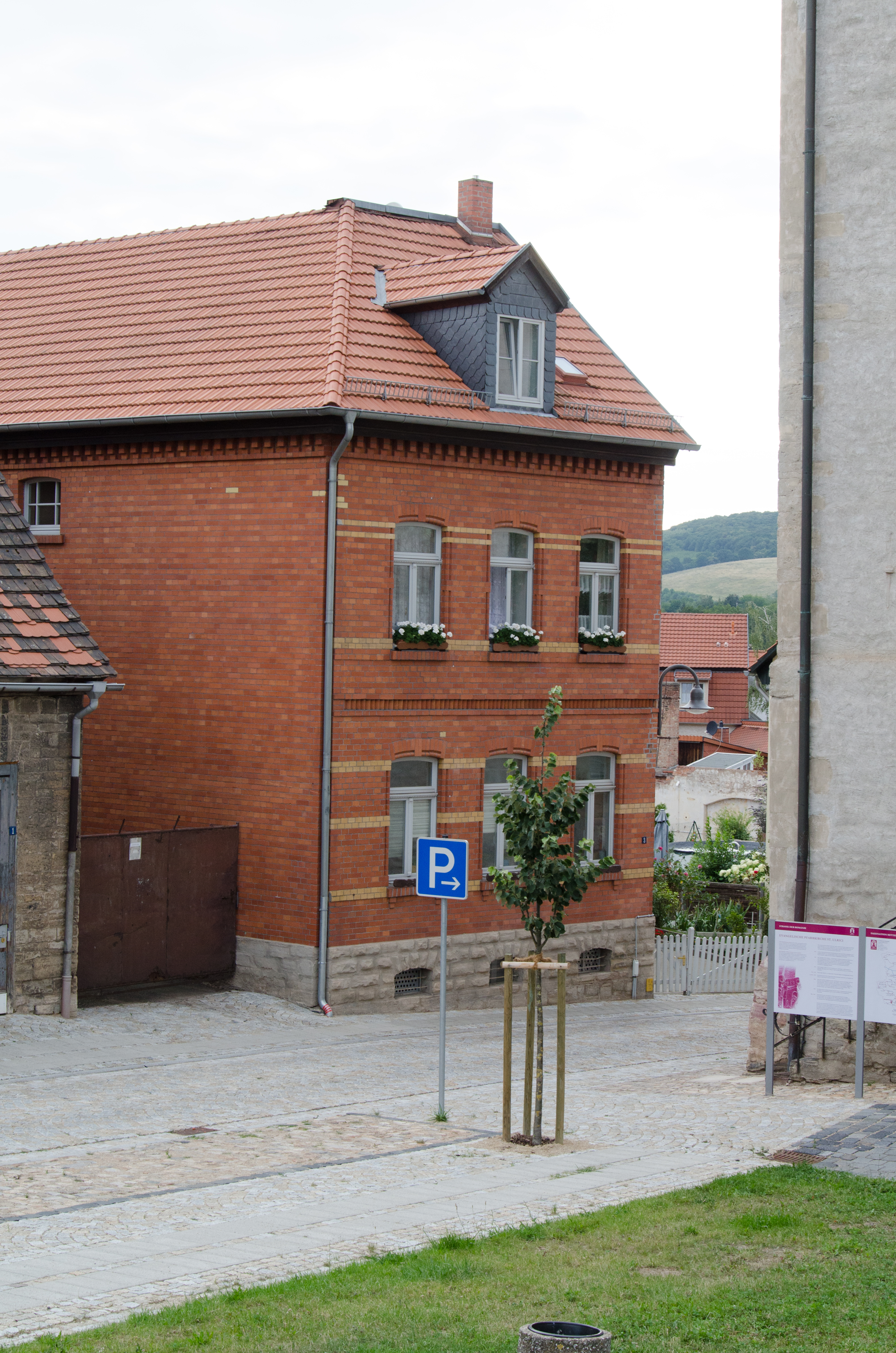 Sangerhausen, Kirchberg 3